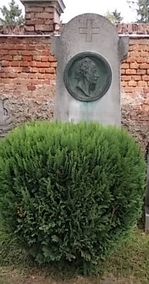 Ignaz Castelli-Wiener Zentralfriedhof (0-1-18)